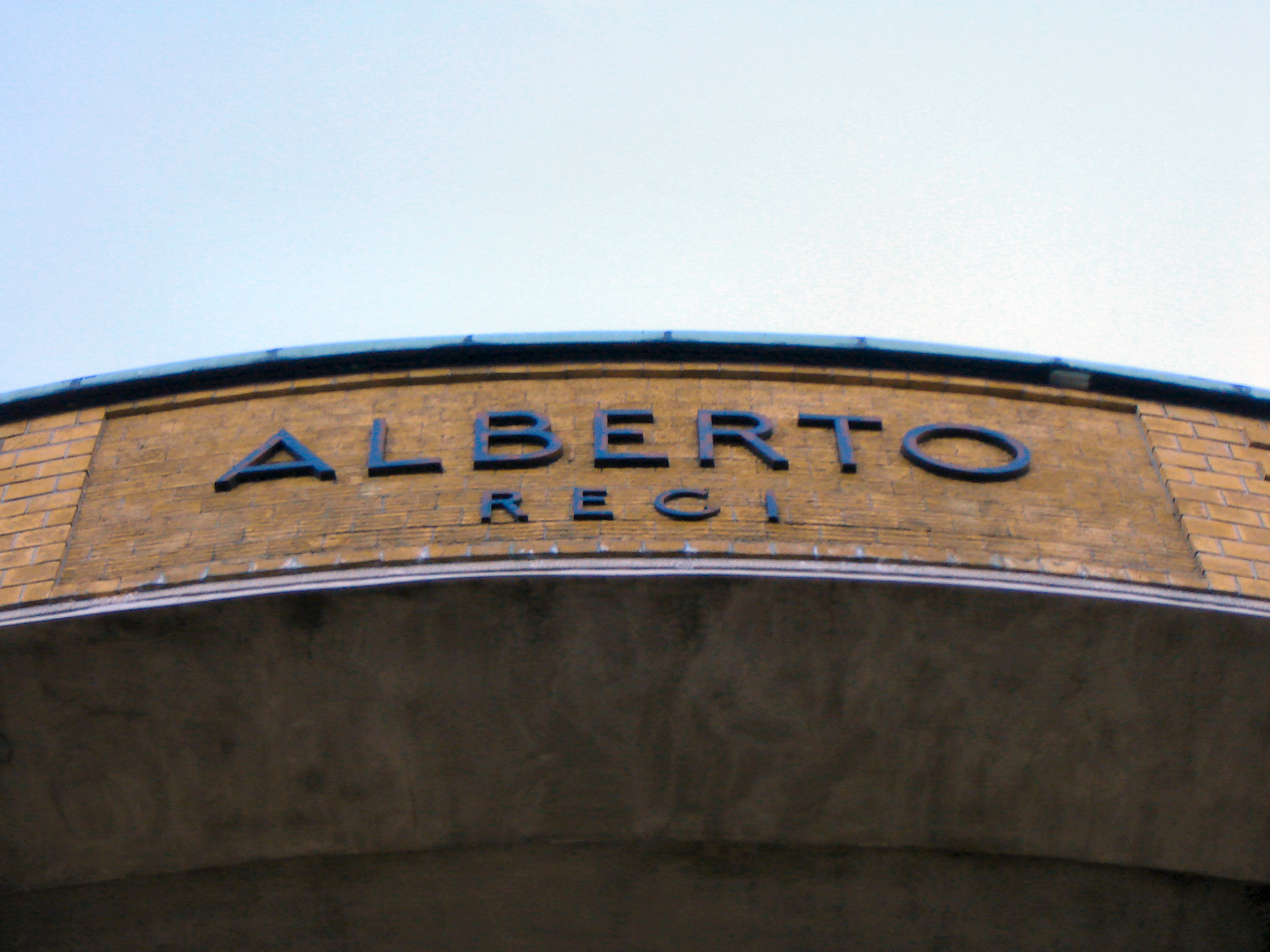 King Albert I Monument in Nieuwpoort, West Flanders, Belgium